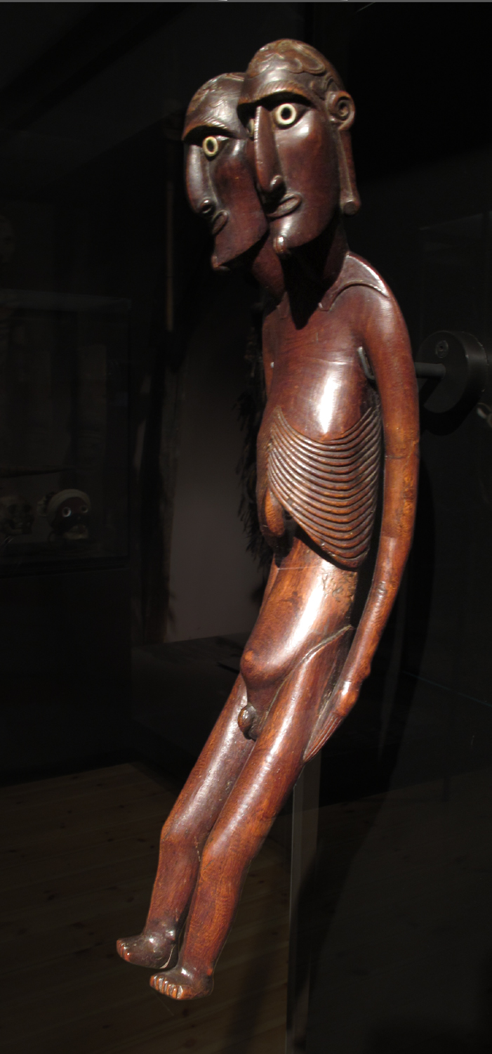 Moaï kava kava. Rapa Nui (Île de Pâques). Bois (sophora toromoro), obsidienne, os d'oiseau. Collecte du chirurgien de marine Gille lors de l'escale de la Dorade sur l'île en septembre 1860. Muséum d'Histoire Naturelle de La Rochelle. H1529. Cf: Dr. Stephen-Chauvet, 1935. Pages 58 sq., fig 116 - 141. Cependant l'exemplaire du Muséum de La Rochelle n'y figure pas : "Vers 1860 les Rapanui ne semblaient pas [en faire l'objet de cultes] (R. Roussel), mais ils y tenaient beaucoup (A. Pinart) et, lors des grandes cérémonies, à Mataveri et au Koro (Routledge), ils les exhibaient, suspendues à leur cou, grâce à une cordelette qui passait soit dans un trou situé au niveau de la nuque, soit autour du cou de ces statues. Taillées dans une espèce de mimosa elles étaient cousues dans de petits sacs "d'étoffe de toile ou de coton" (A. Pinart). Balesteros avait trouvé, dans presque toutes les huttes , des statuettes , de pierre ou de bois, "qui gardaient la porte contre l'entrée de toute influence maléfique"." (Stephen-Chauvet p. 58. Bibliographie p. 83. Aucune mention de La Dorade, en 1860, dans les pages consacrées à l'"Historique", p. 10 sq.) L'île de Pâques et ses mystères (Easter Island and its Mysteries), on-line translation by Ann Altman